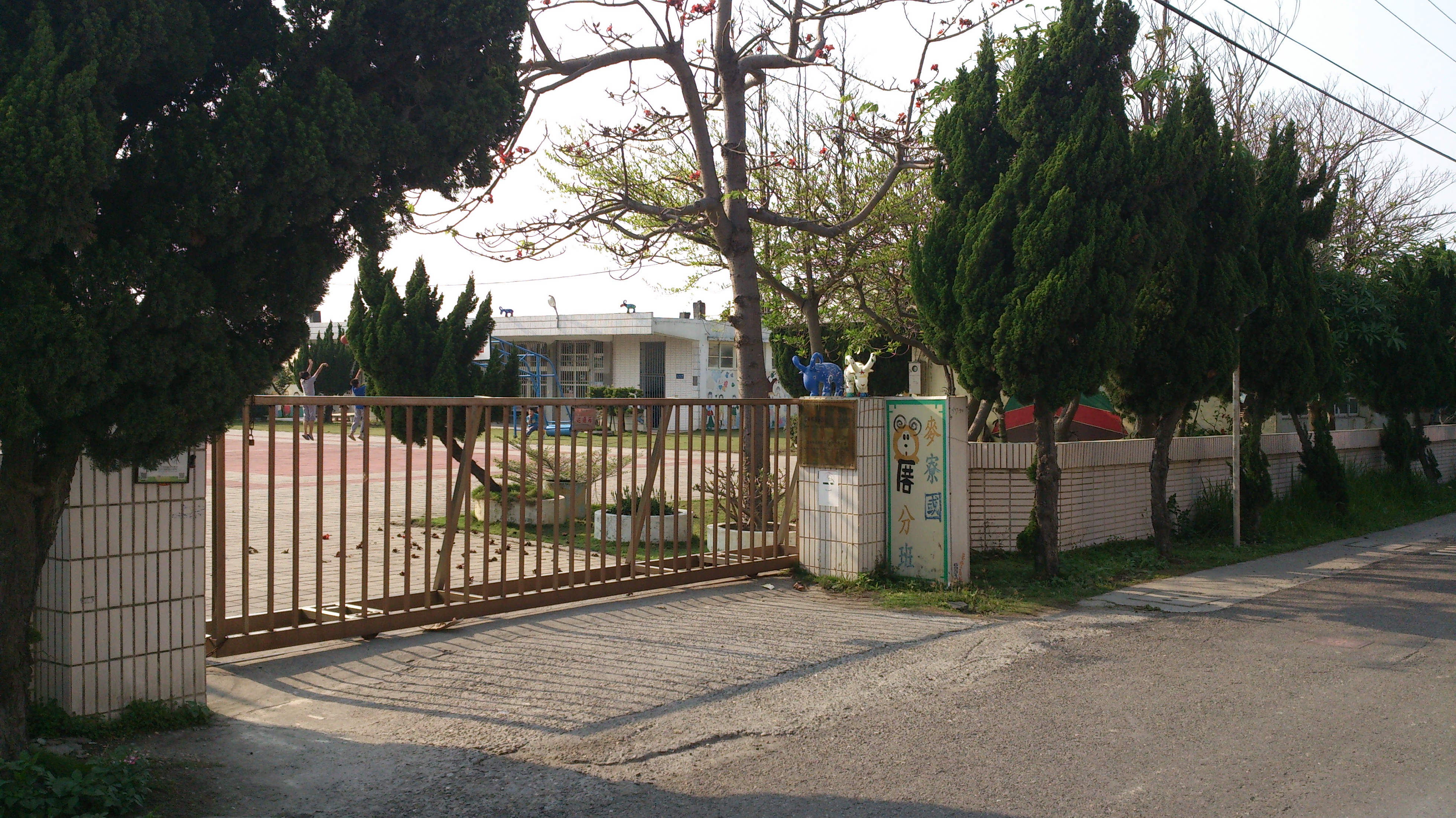 雲林縣麥寮鄉的麥寮國小在楊厝社區的分班。